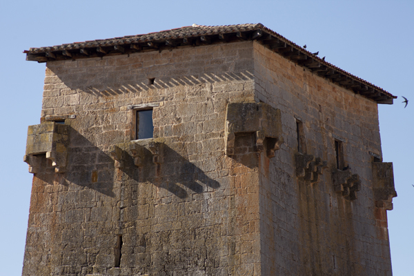 TorreÃ³n de FernÃ¡n GonzÃ¡lez